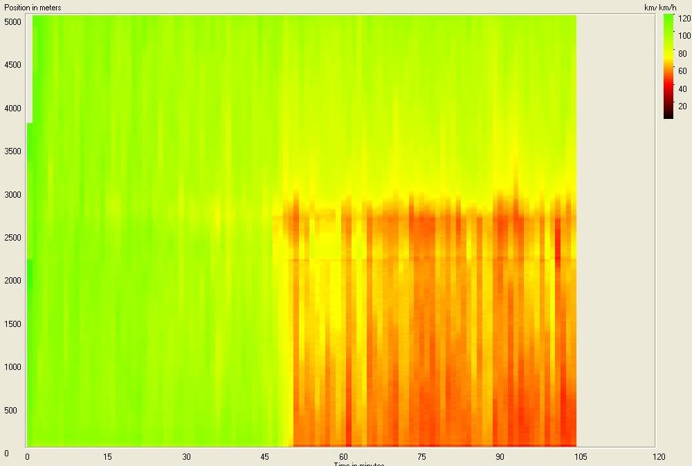 screenshot van snelheidscontour van eigen ontwikkeld model (in Delhpi)